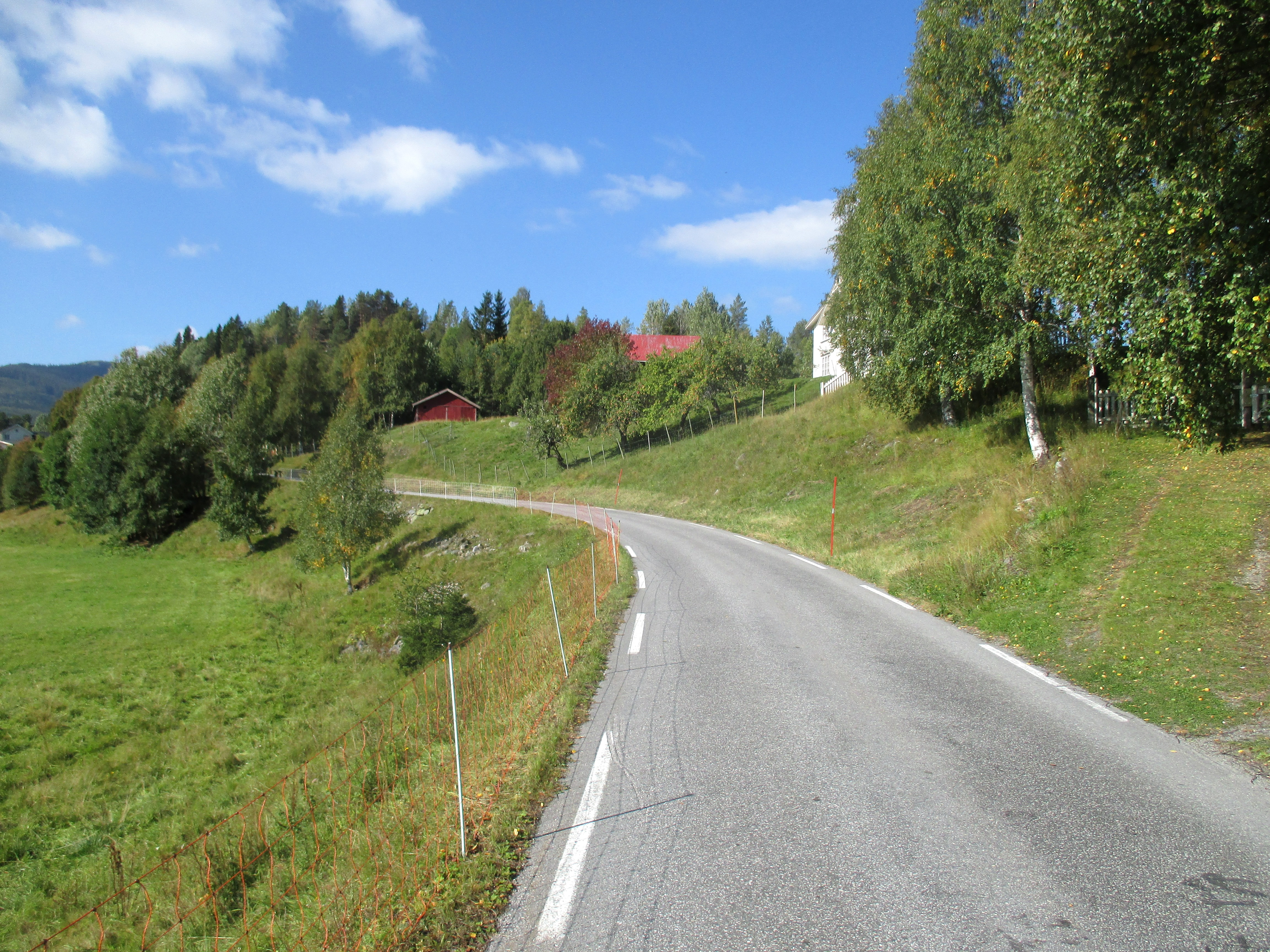 Fylkesvei 652 like ved Tuddal kirke